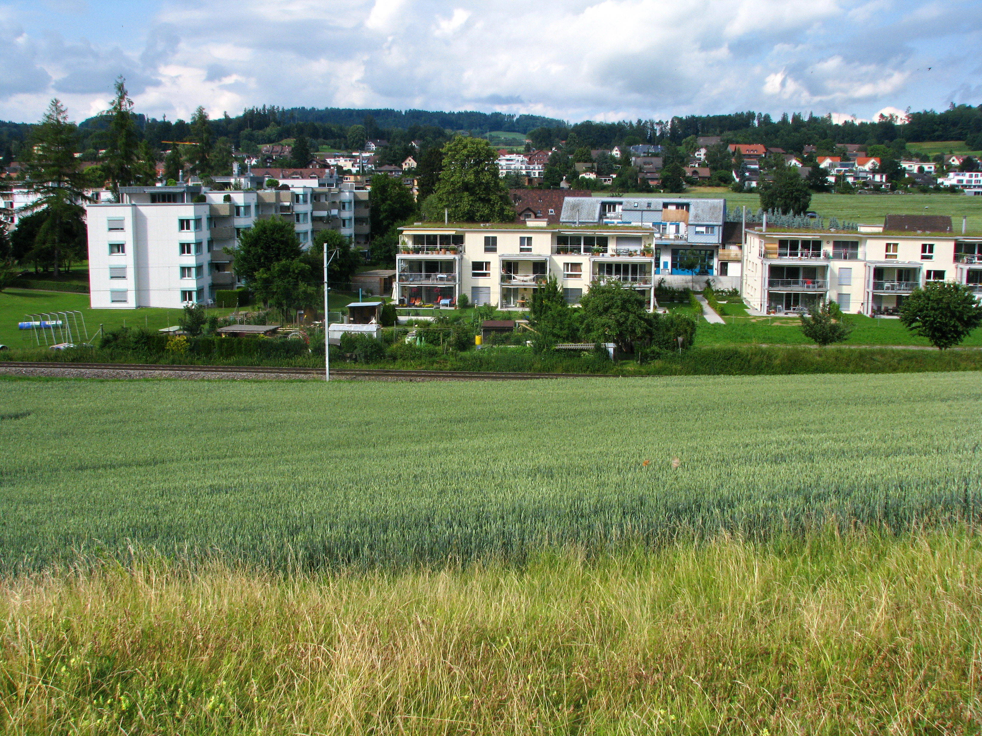 Irgenhausen (Pfäffikon), Ansicht vom römischen Kastell